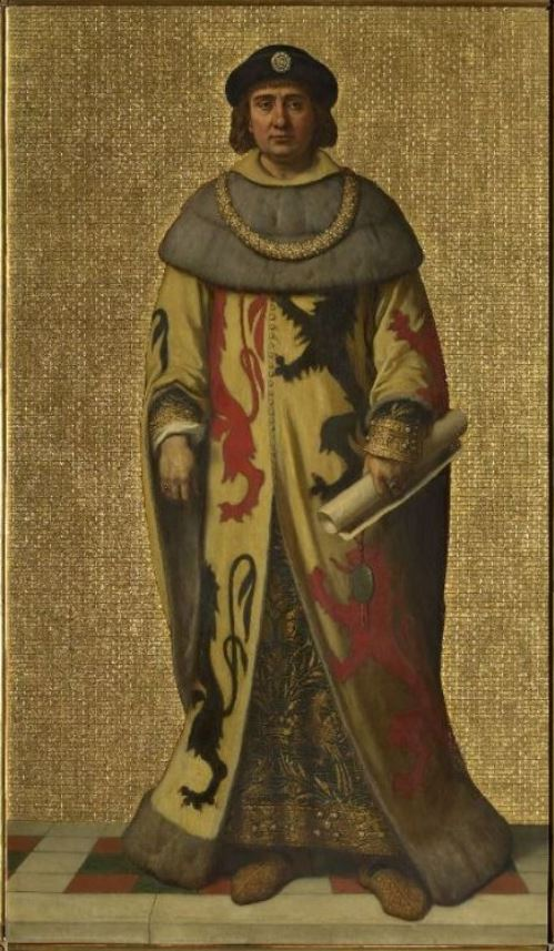 William I of Hainaut, as depicted by Louis Gaillat for the hemicycle of the Belgian Senate